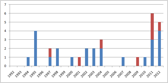 Jornalistas mortos no Brasil. Motivo confirmado Motivo não confirmado Fonte